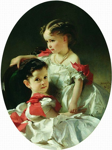 Mar'ja e Sof'ja Perovskaja